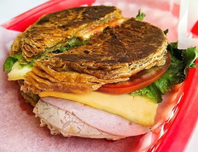 Los pasteles son una preparación típica de la cocina costarricense, propia de las sodas y cantinas. Este en específico está "arreglado", es decir, que se sirve con ensaladas y aderezos dentro.